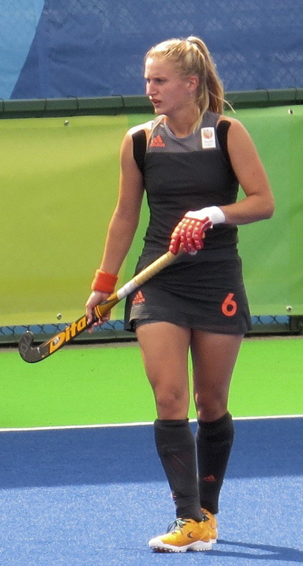 Rio 2016.Hóquei na grama. Feminino. Holanda x Espanha. sx 87